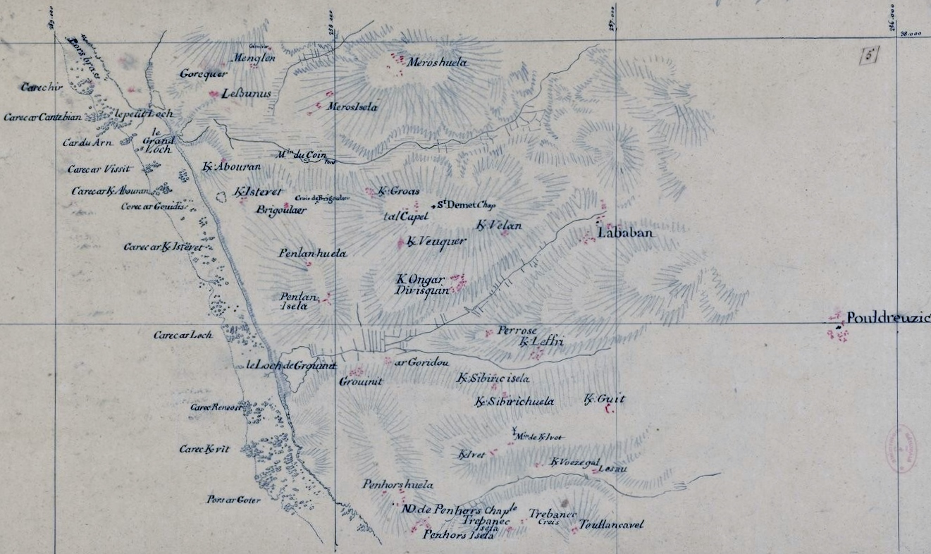 Carte de la région de Penhors datant de la période 1771-1785